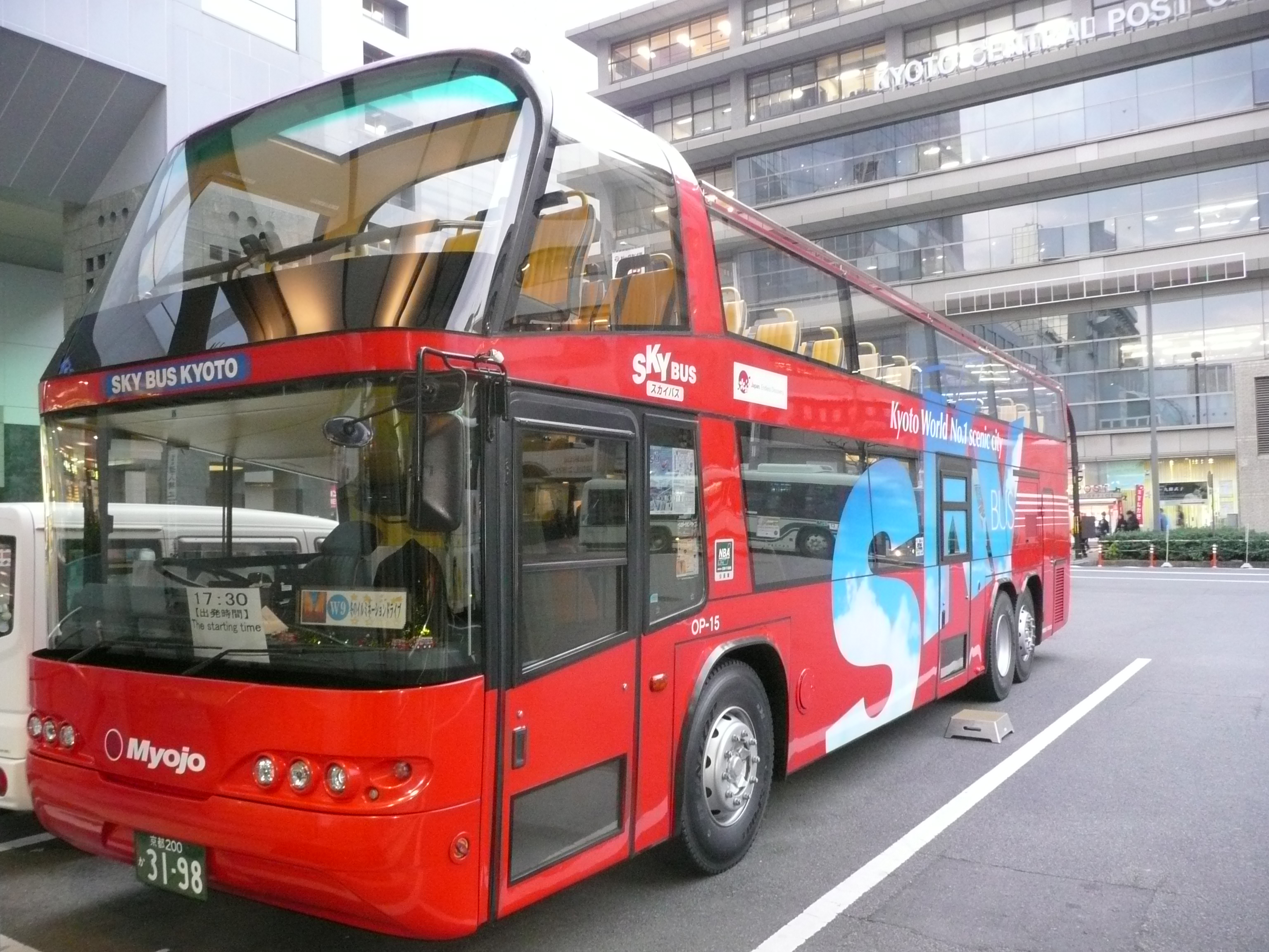 烏丸口乗場のスカイバス